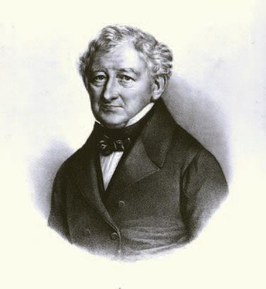 Wilhelmine Suhrlandt: Simon Hermann Nonnen, um 1850 Lithografie, 31,5 x 25 cm Bezeichnet. u. l.: Wilhelmine Suhrlandt auf Stein gez. nach R. Suhrlandt, Druck von Mercier Berlin Inv. Nr. A. 0347 Focke-Museum Bremen Simon Hermann Nonnen (1777